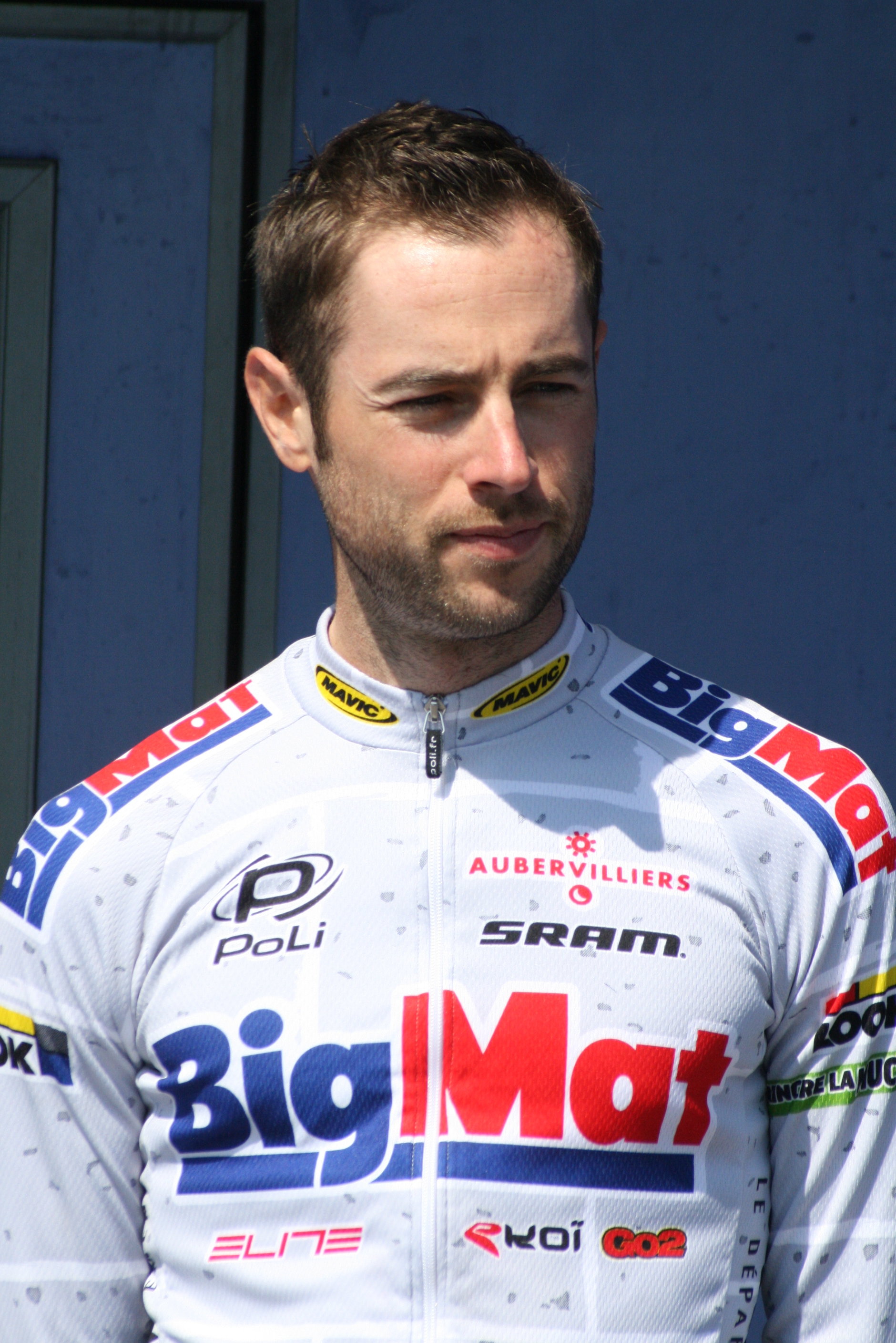 Présentation des coureurs au départ de la première étape Sylvain Georges